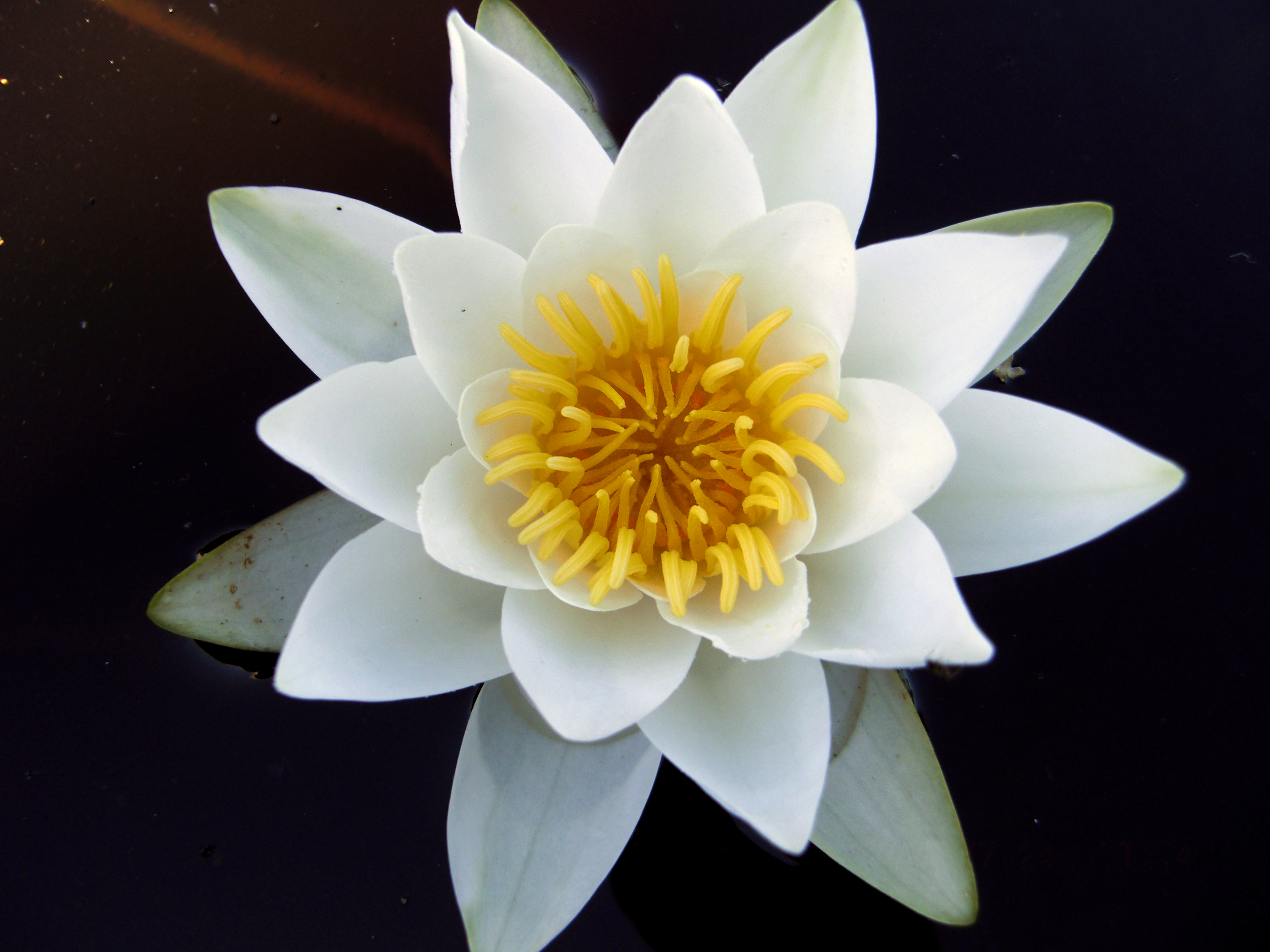 En vit näckros (Nymphaea alba) på sjön Viren i Tingsryds kommun, Kronobergs län, Småland, Sverige.